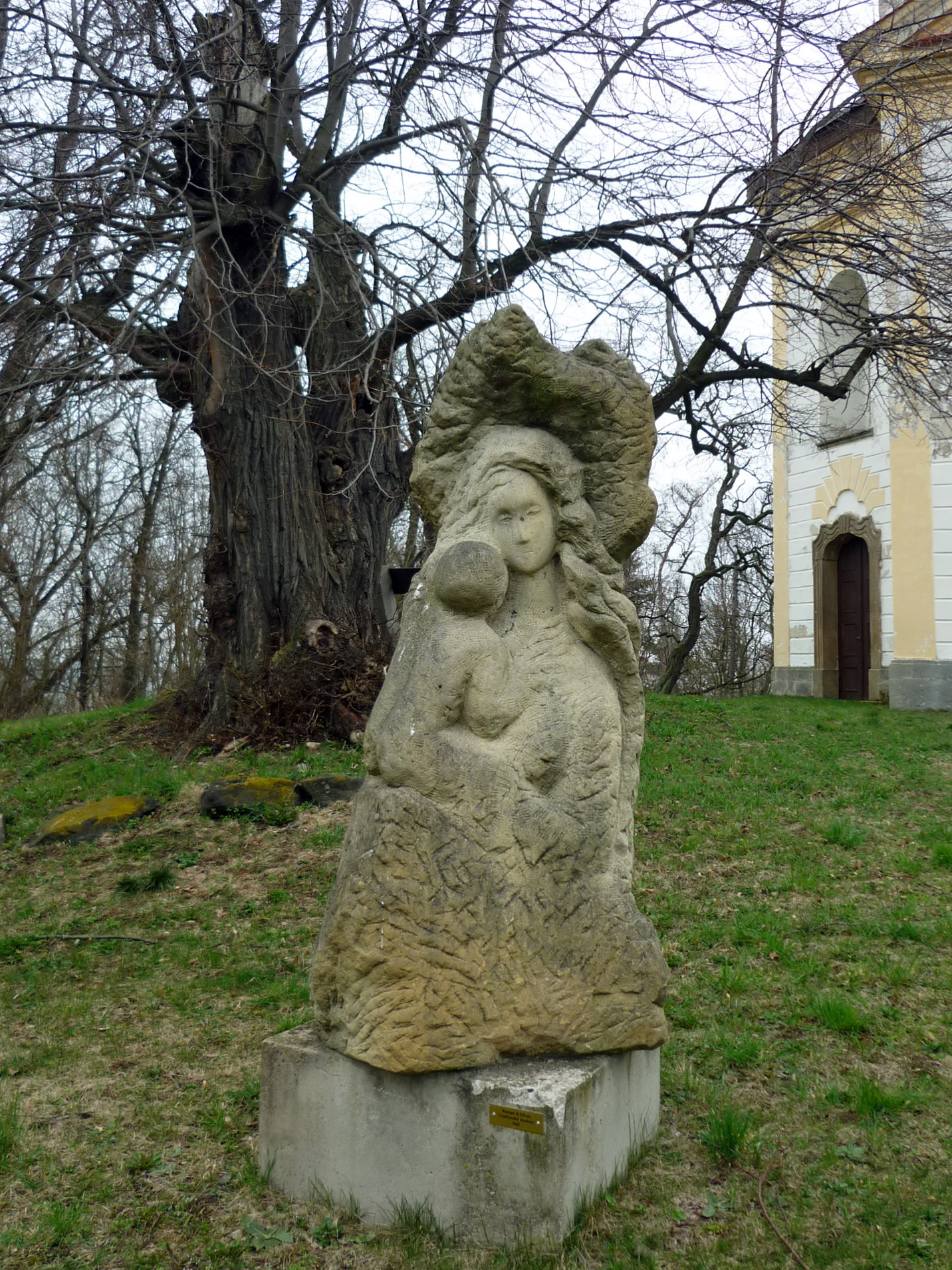 Skulpturen am Kreuzweg zur Wallfahrtskapelle auf dem Winteritzer Berg: Skulptur von Roman Skřelina: Vintířovská Madona (Winteritzer Madonna) (2001)